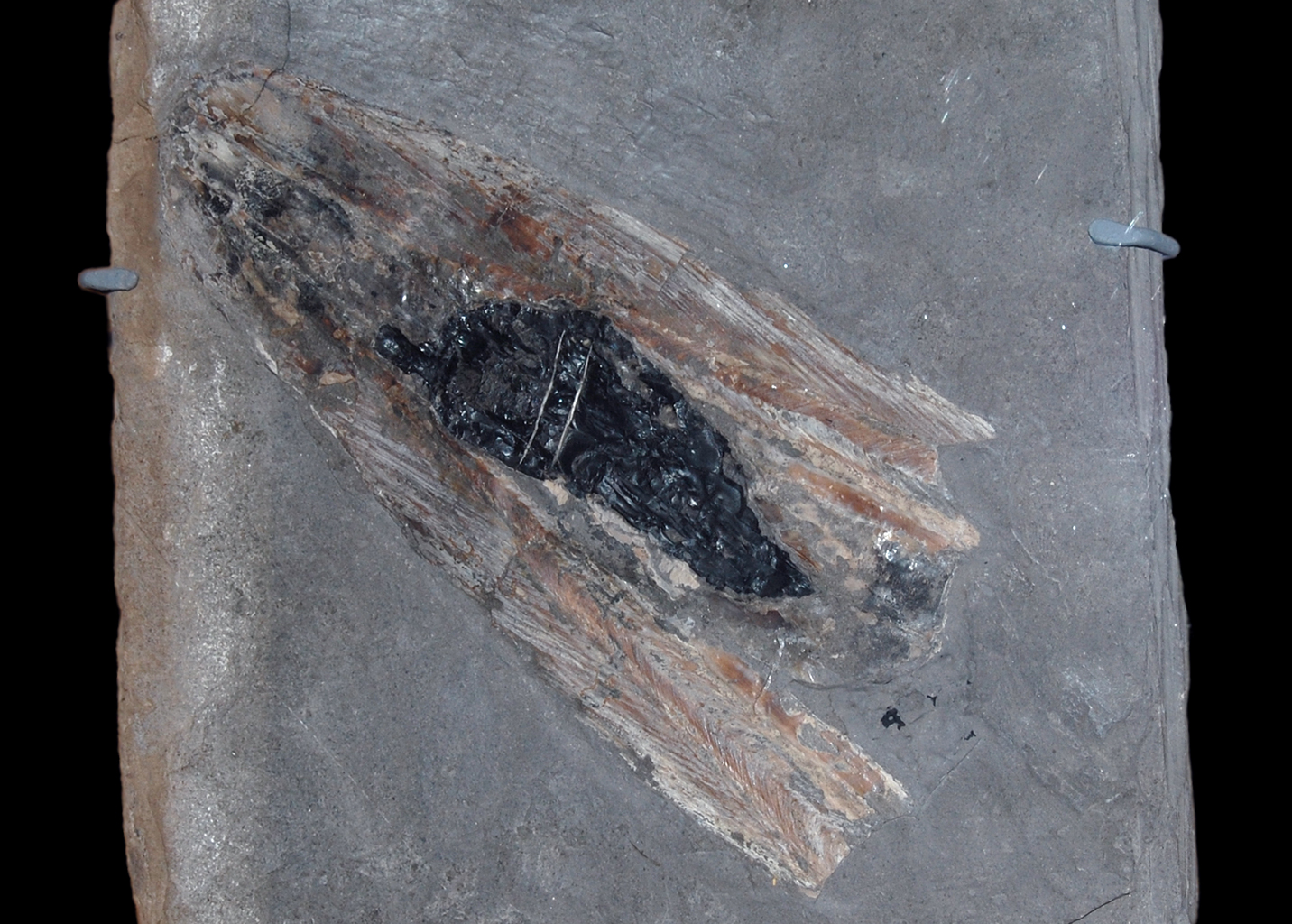 Naturhistorisches Museum Wien